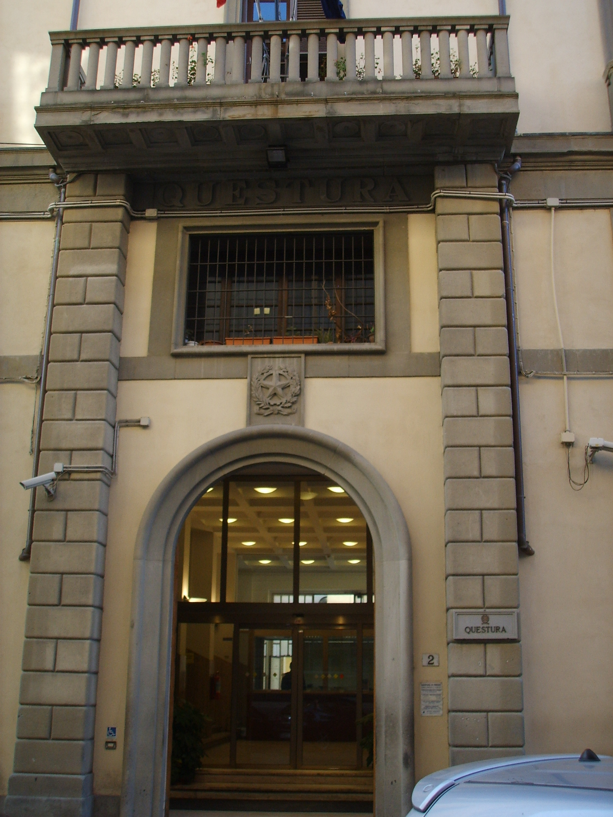 Questura di firenze